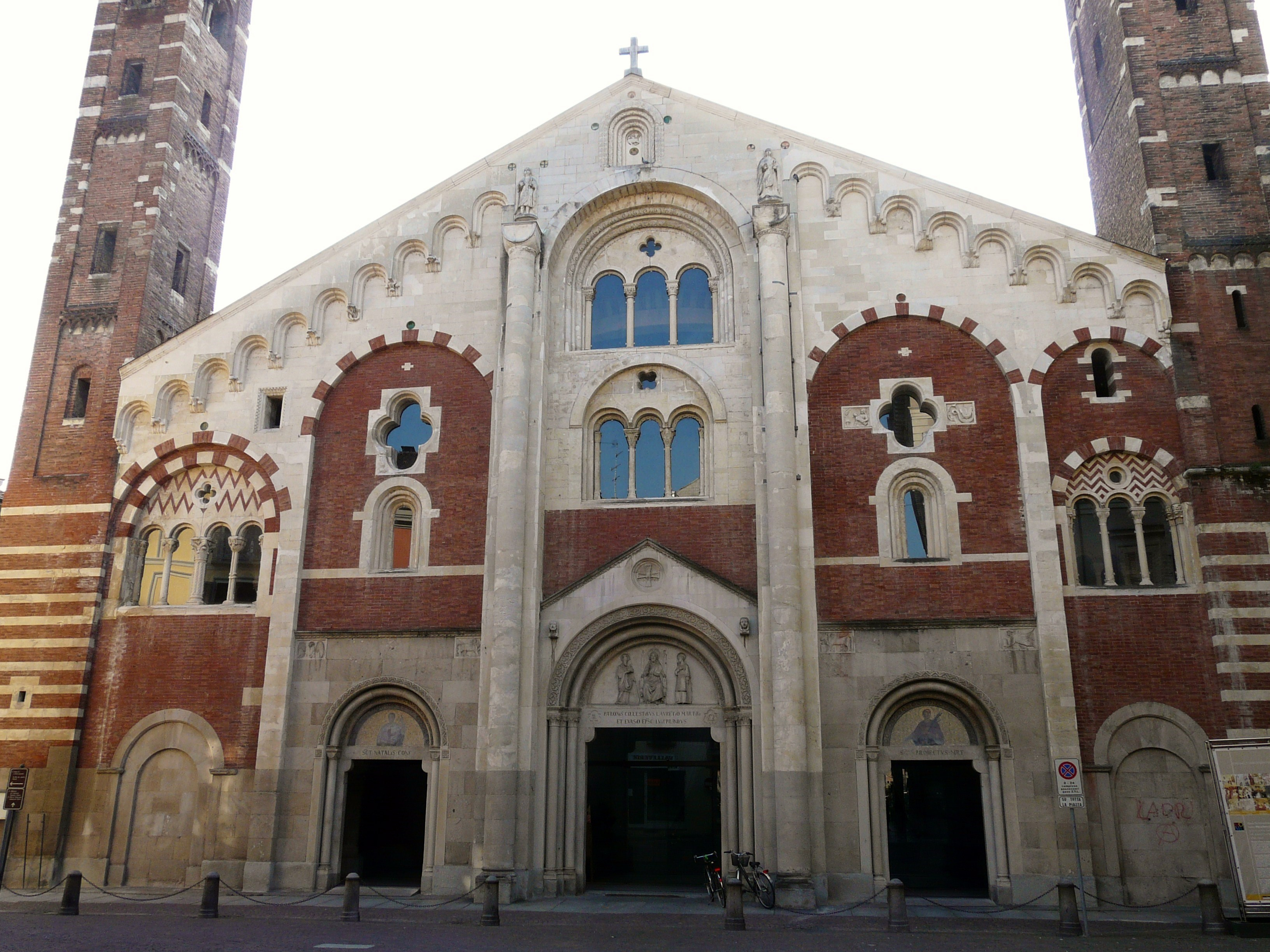 Facciata della cattedrale di Sant'Evasio, Casale Monferrato, Piemonte, Italia